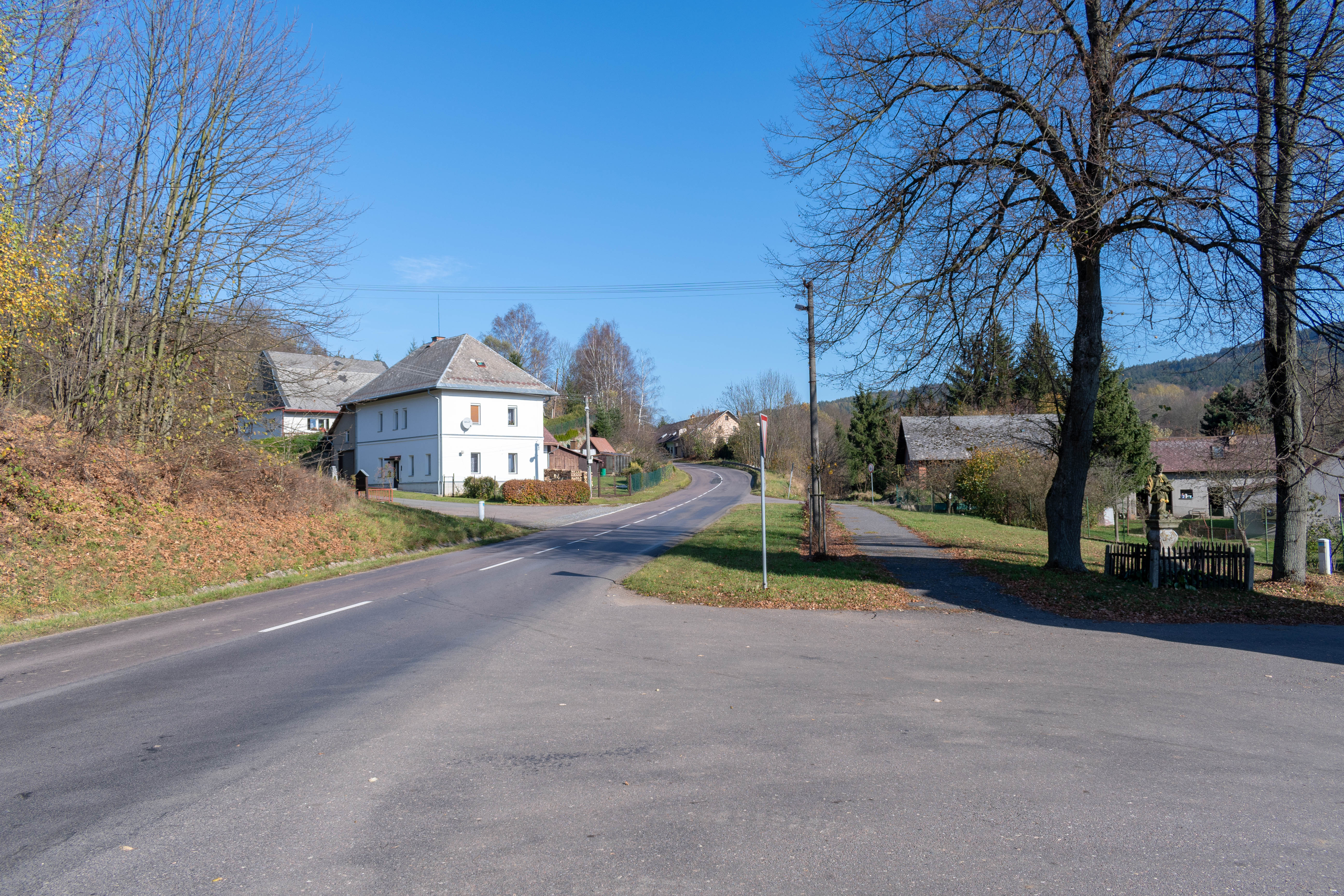 Celkový pohled na obec Celné